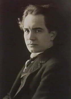 fotografie Edwarda Golla